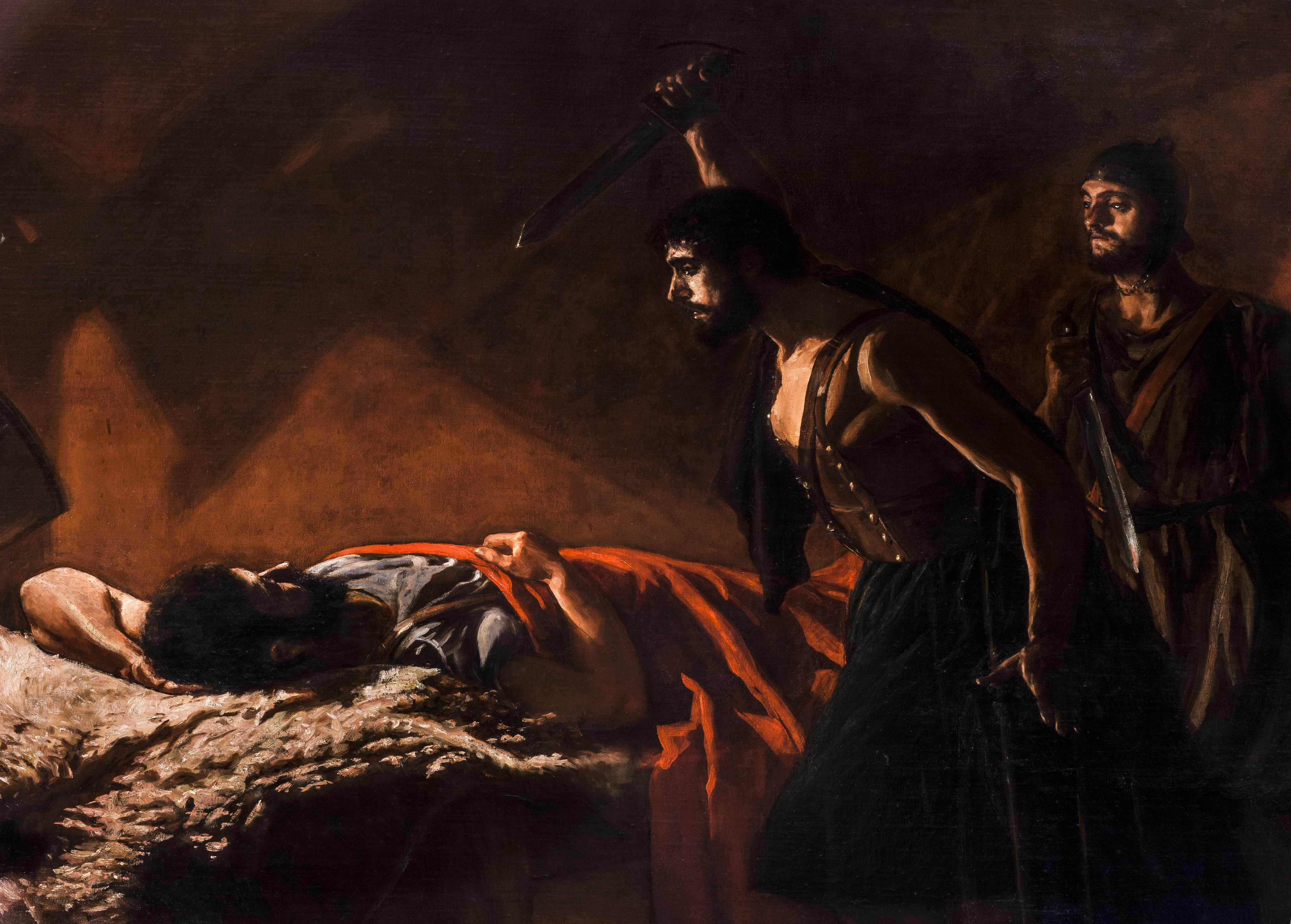 El lienzo representa el asesinato del caudillo lusitano Viriato, ocurrido en el año 139 a. C.